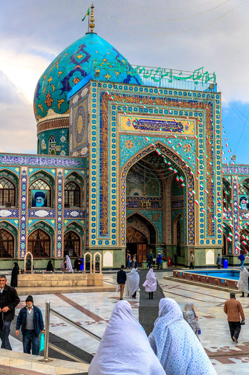 Imamzadeh Saleh Mosque, Tehran